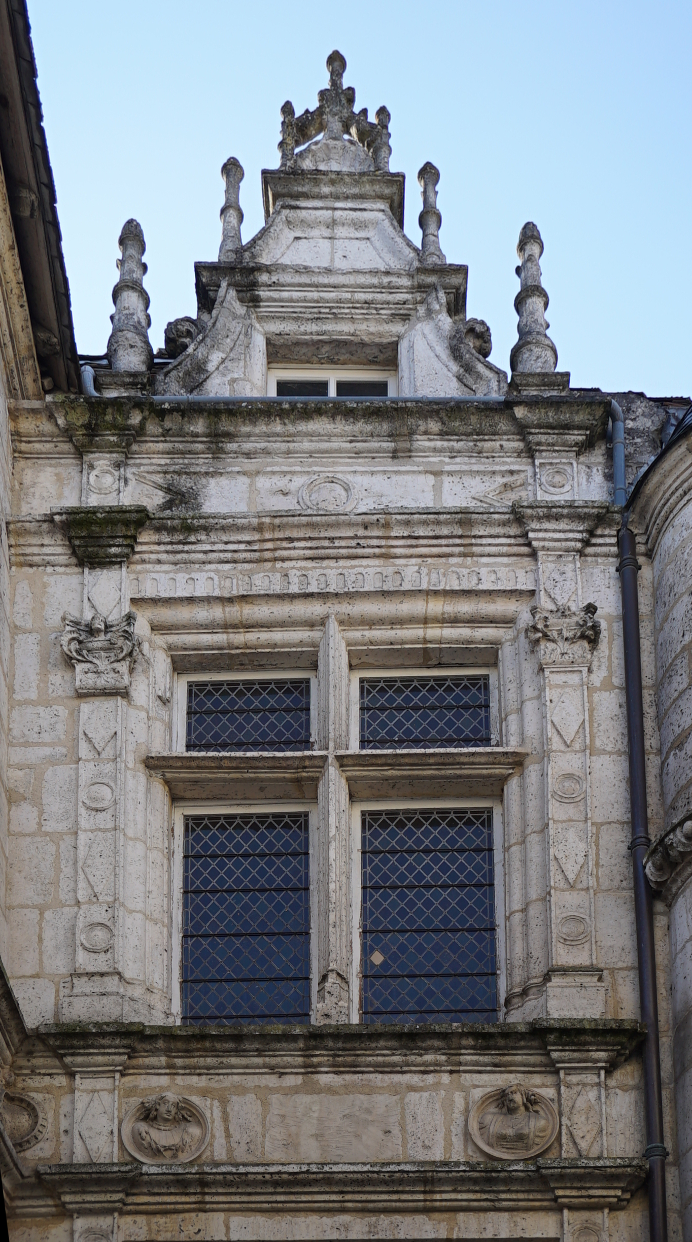 de l'hotel st simon.